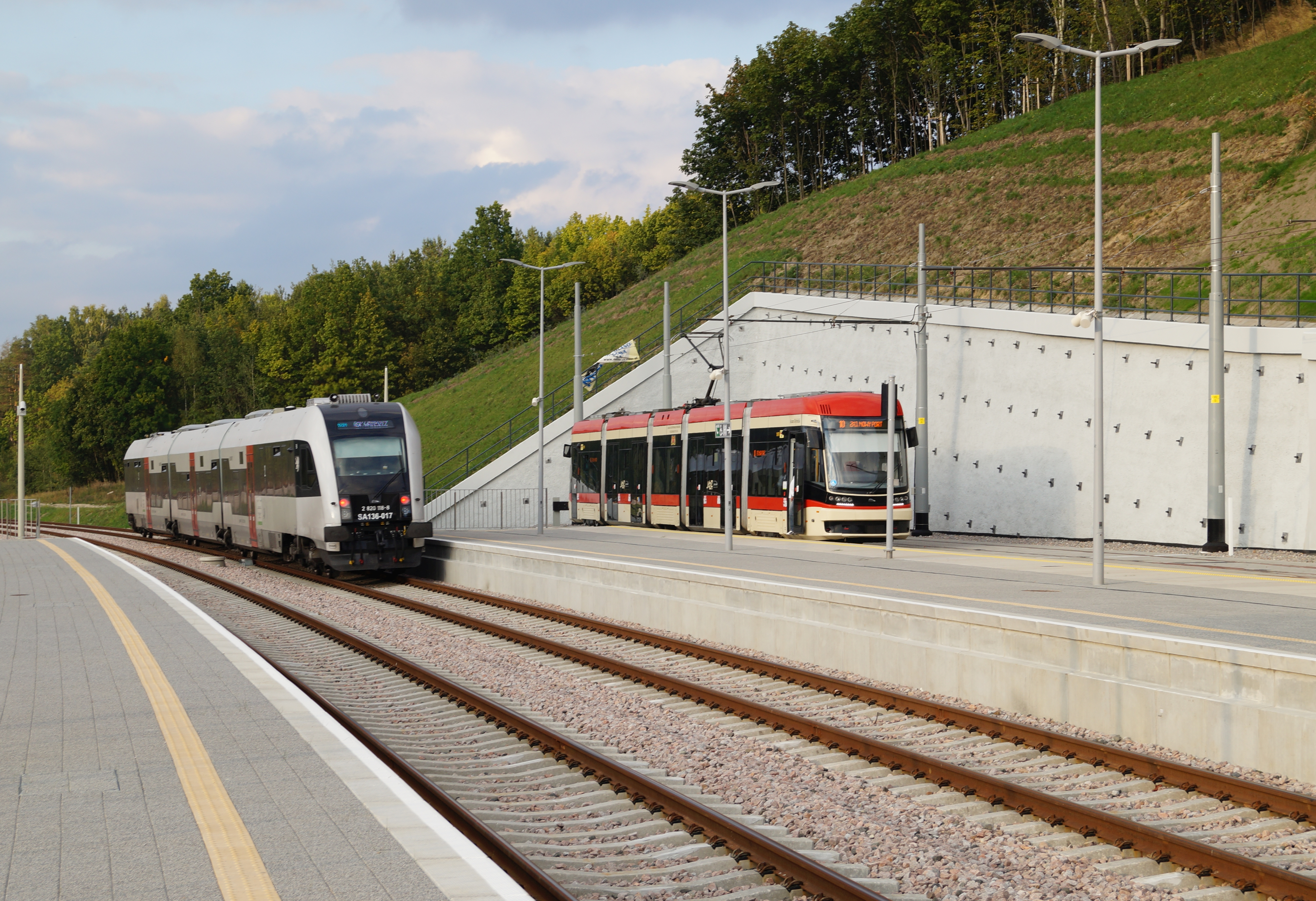 The making of this document was supported by Wikimedia Polska Association, within Wikigrant no. WG 2015-34. English | polski | +/− SA136 i Jazz Duo na przystanku Gdańsk Brętowo